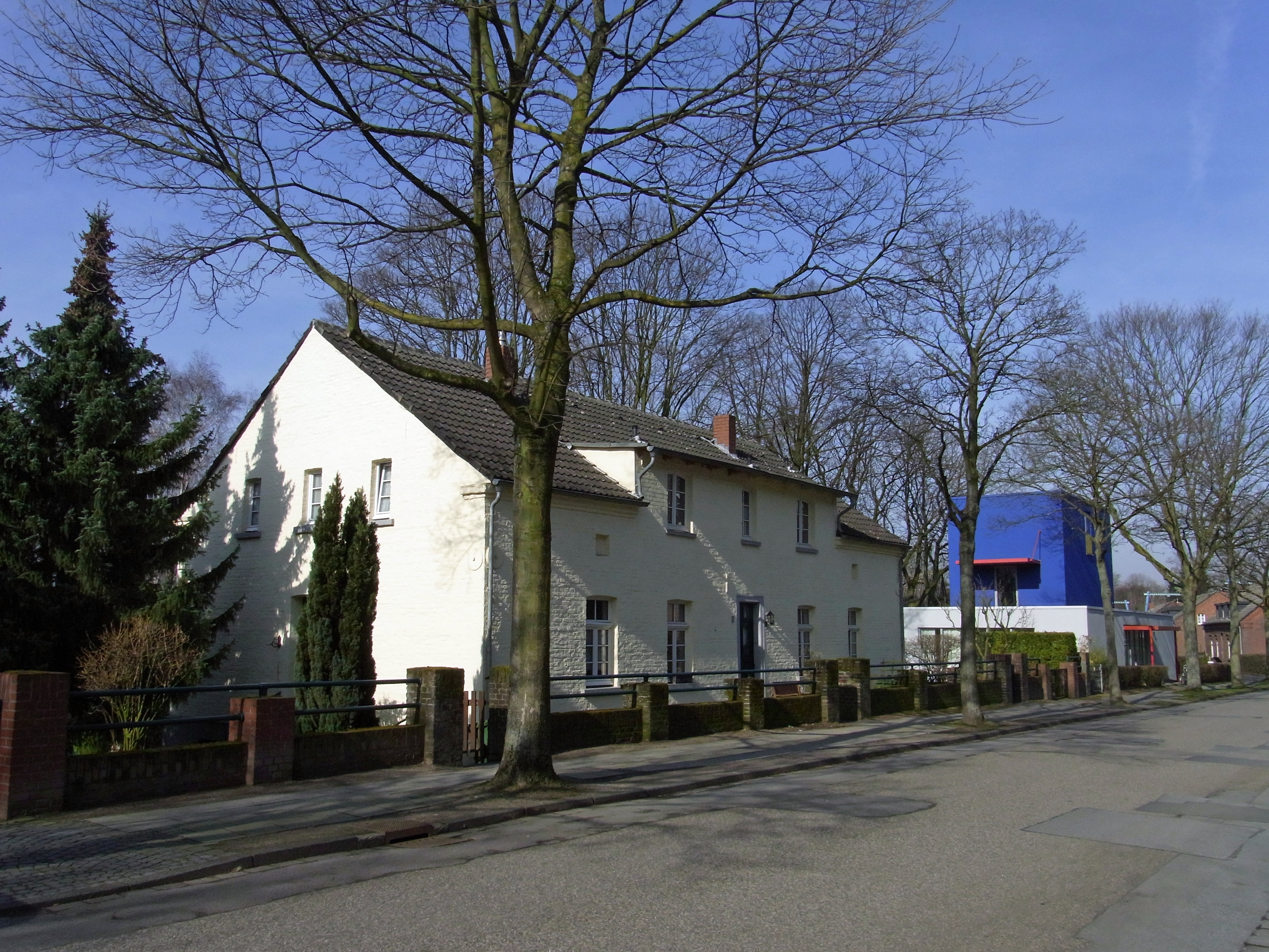 Siedlung Eisenheim